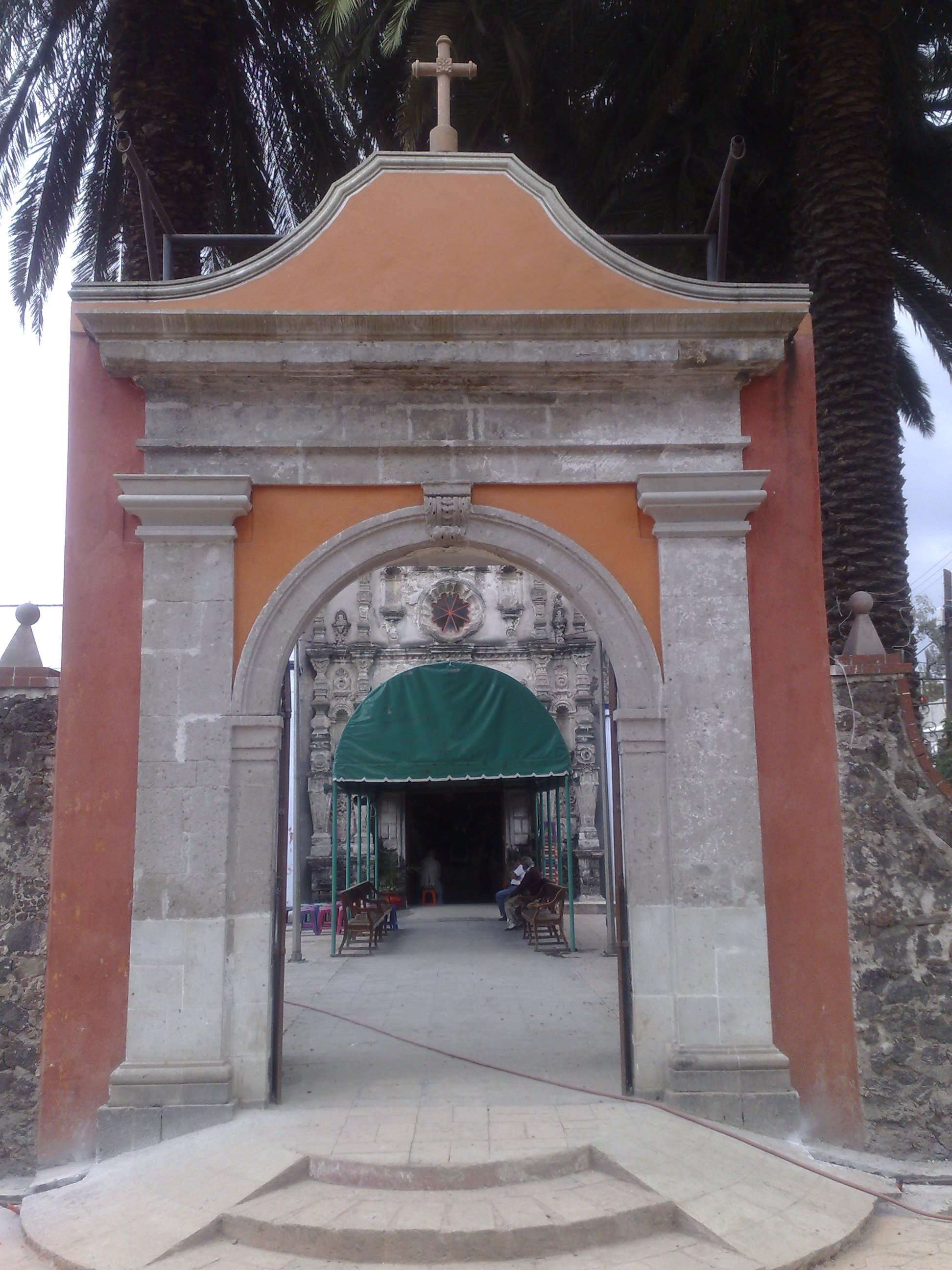 Atrio y Parroquia de Santa Anita Zacatlalmanco Huehuetl (Iztacalco)